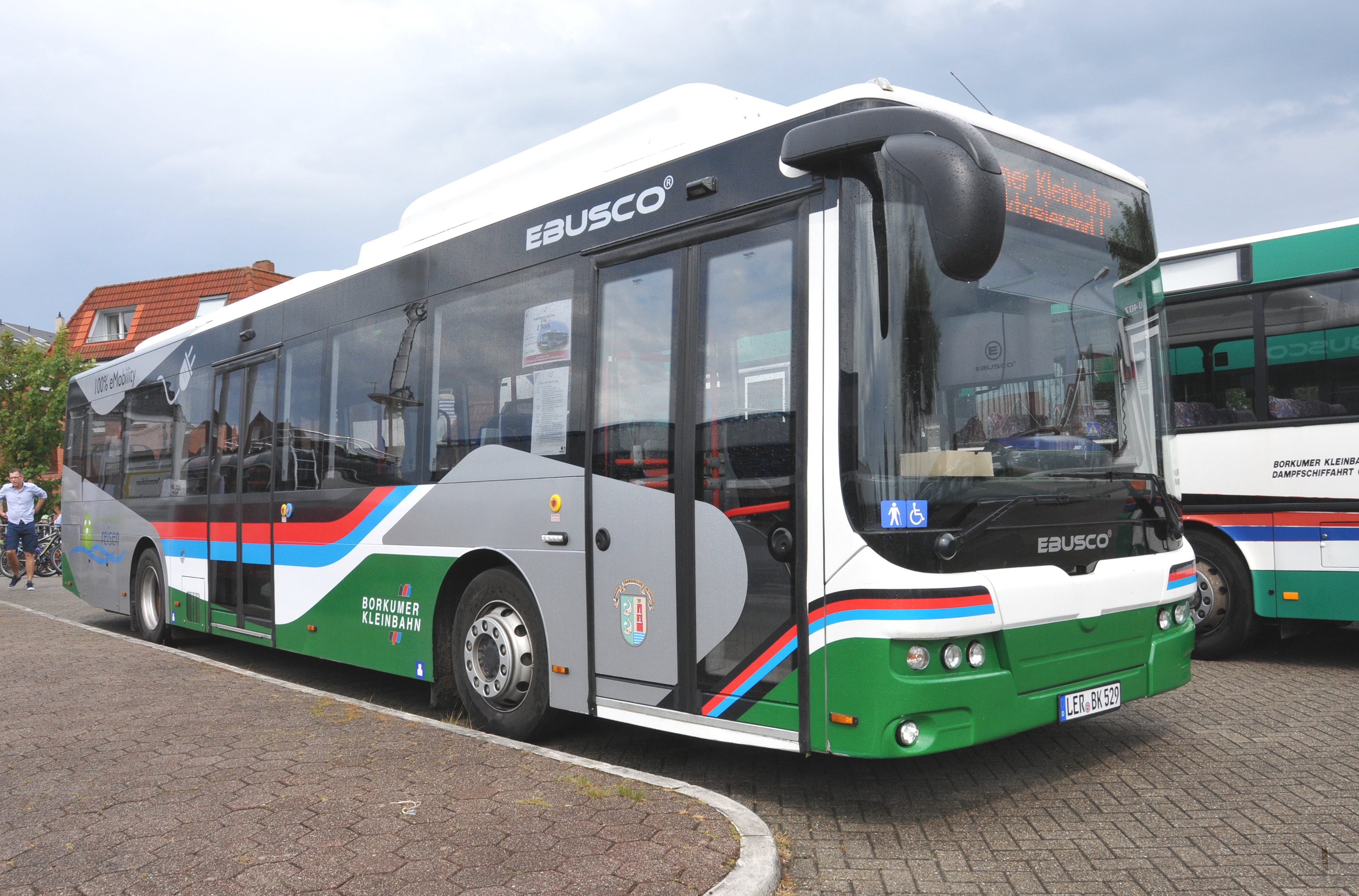 Ebusco 2.0 (kent:LER BK 529) elektrische bus, 12 meter bij Borkumer Kleinbahn te Borkum.